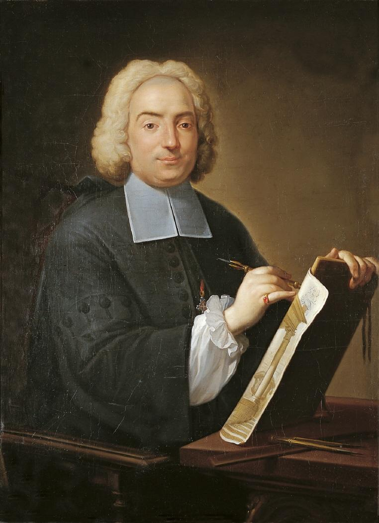 Retrato del arquitecto italiano Filippo Juvara (1678-1736).